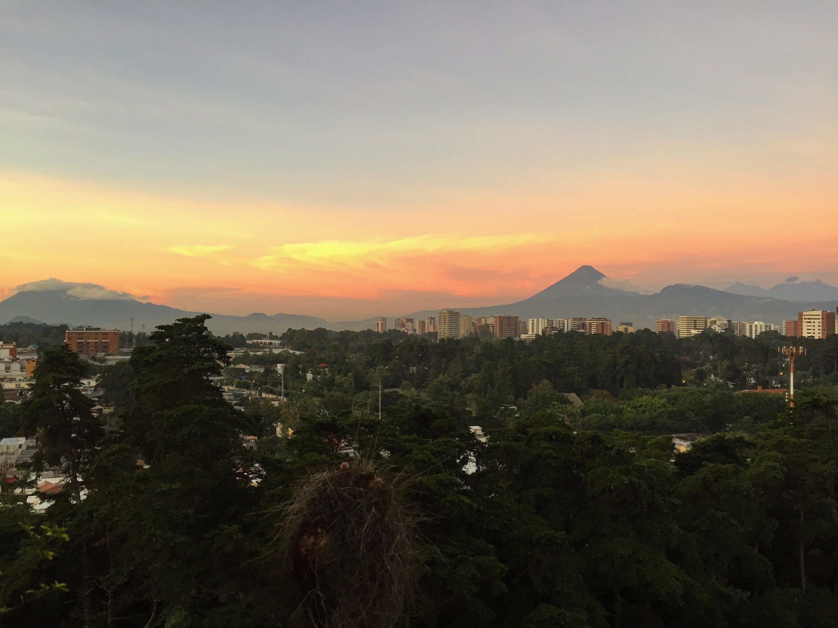 Cuatro volcanes